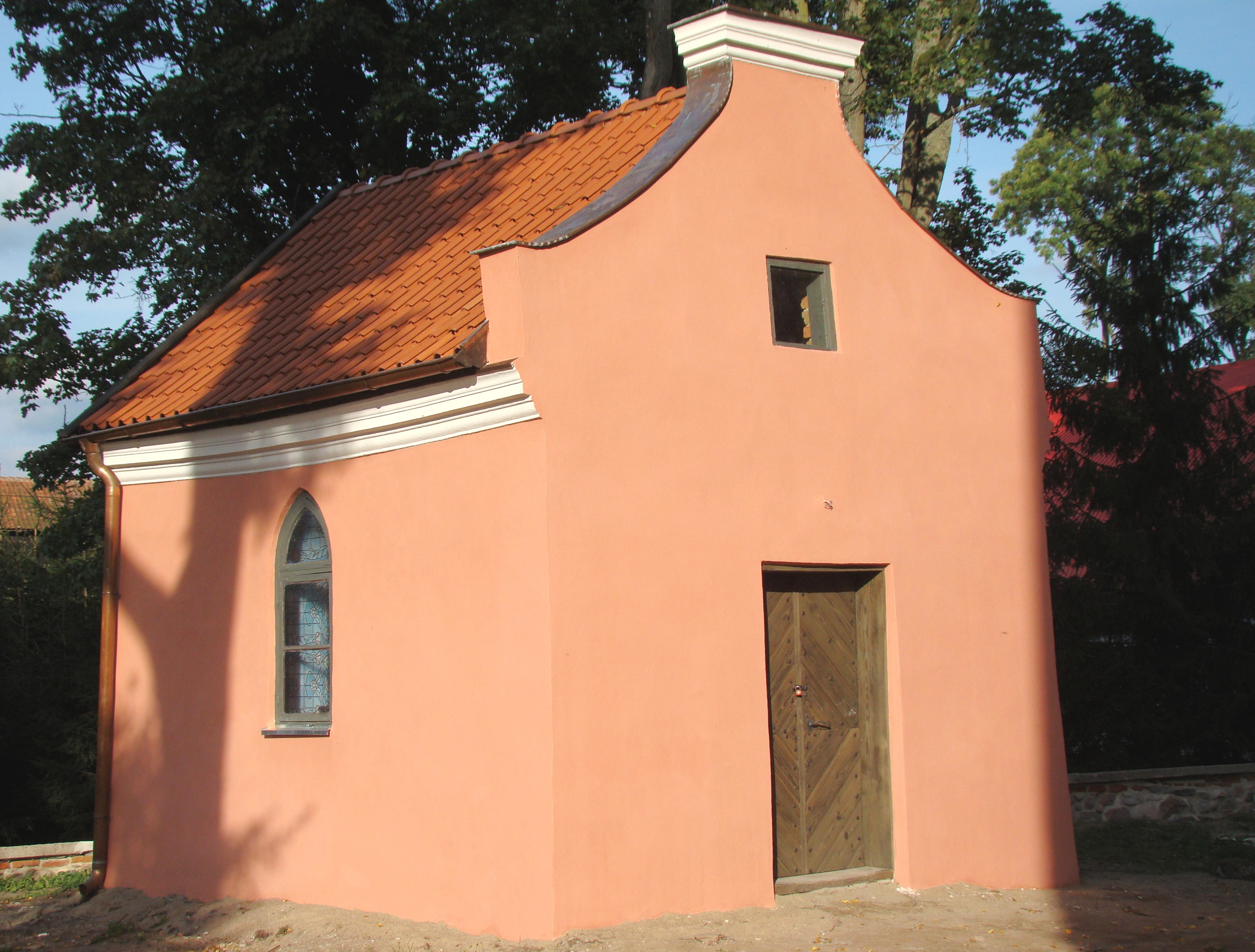 Kraszewo - kaplica p.w. św. Rocha (zabytek nr 830 z 1.09.1968)